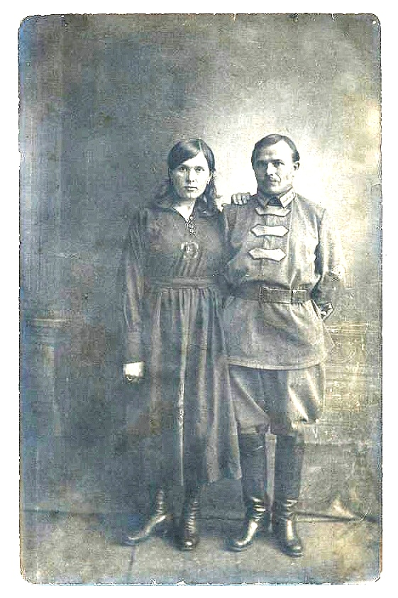 Вишняковы Василий Фёдорович с супругой Александрой